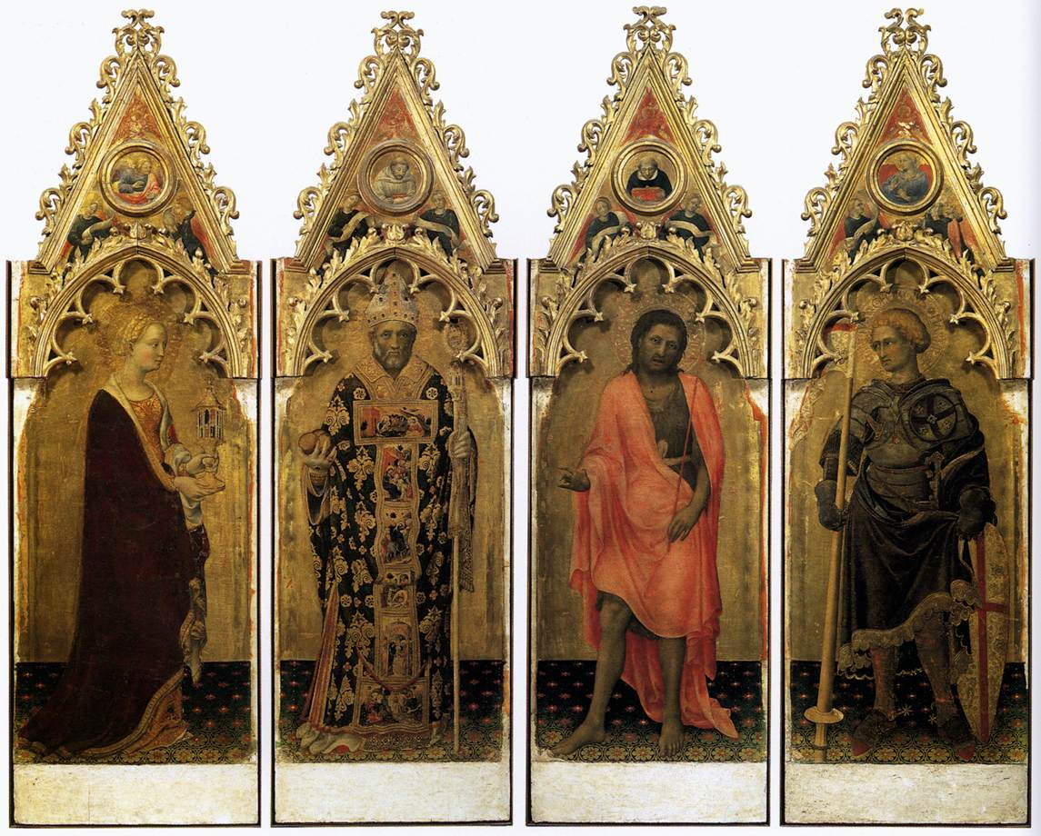 (v.li.n.rechts) Maria Magdalena - Hl. Nikolaus von Bari - Johannes der Täufer und der Hl. Georg.